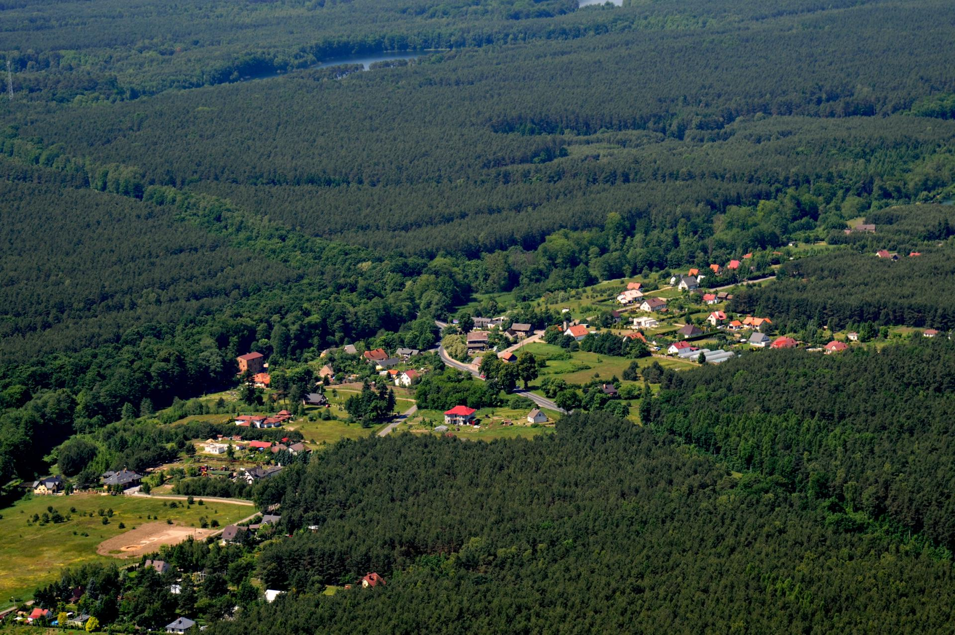 Zdroisko z lotu ptaka